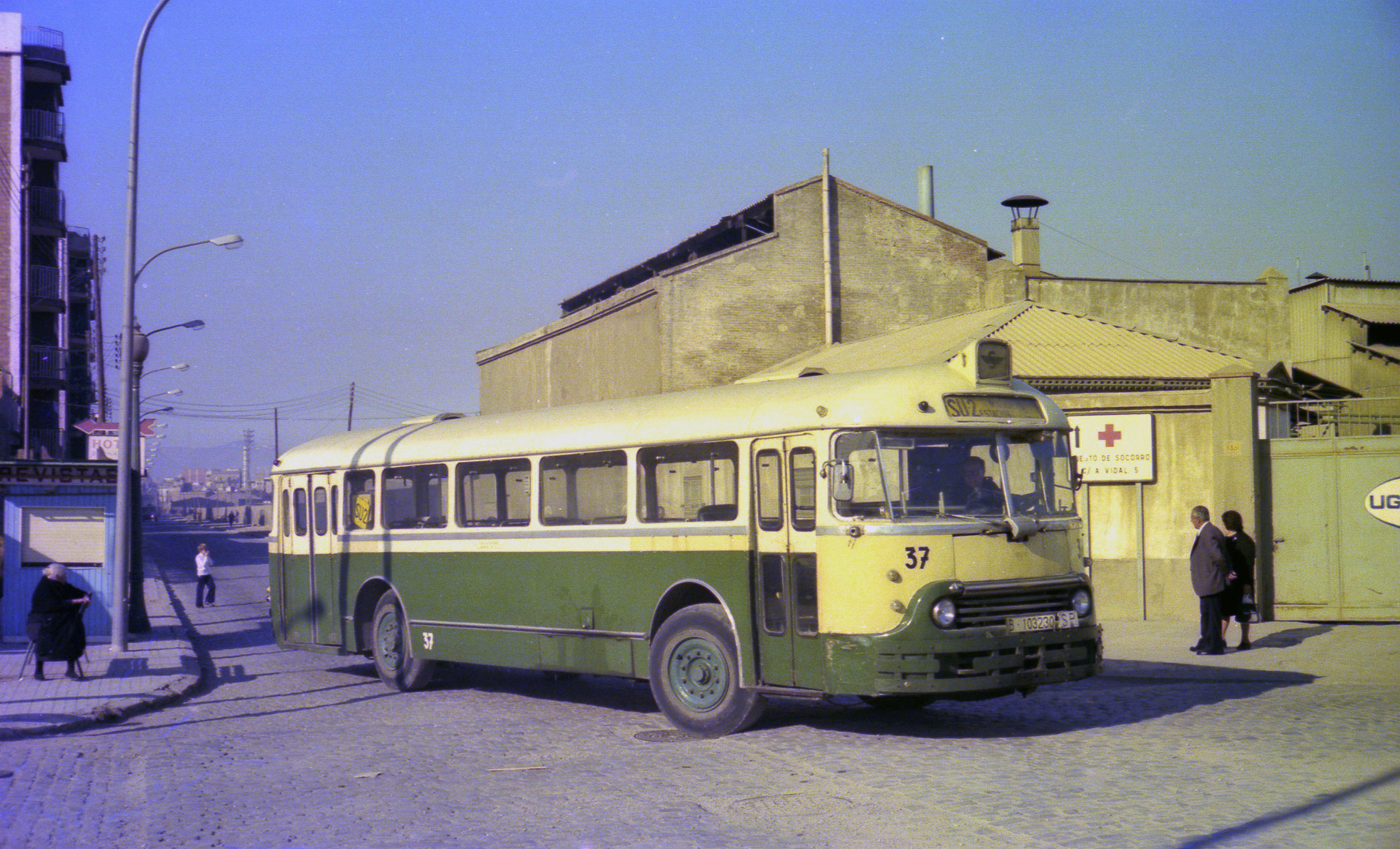 El autobús Chausson APH 53, número 37 de Urbanizacines y Transportes S.A., prestando servicio en la línea suburbana SU2 en San Adrián del Besós.